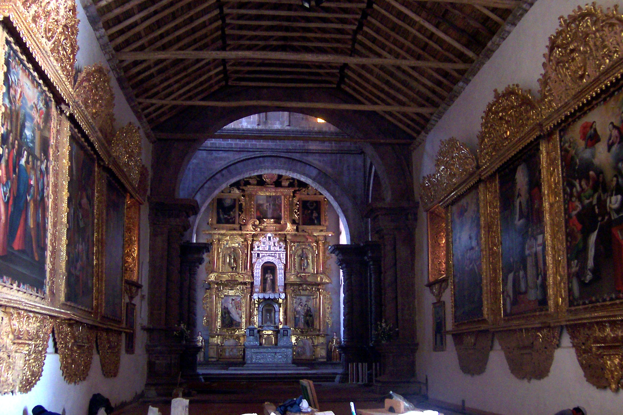 Juli. San Juan de Letrán. Altar mayor Autor: Alfredobi Fecha: Agosto 2006